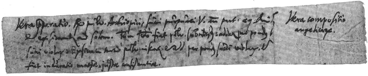 Rezept der Frankfurter Pillen, Fotografie